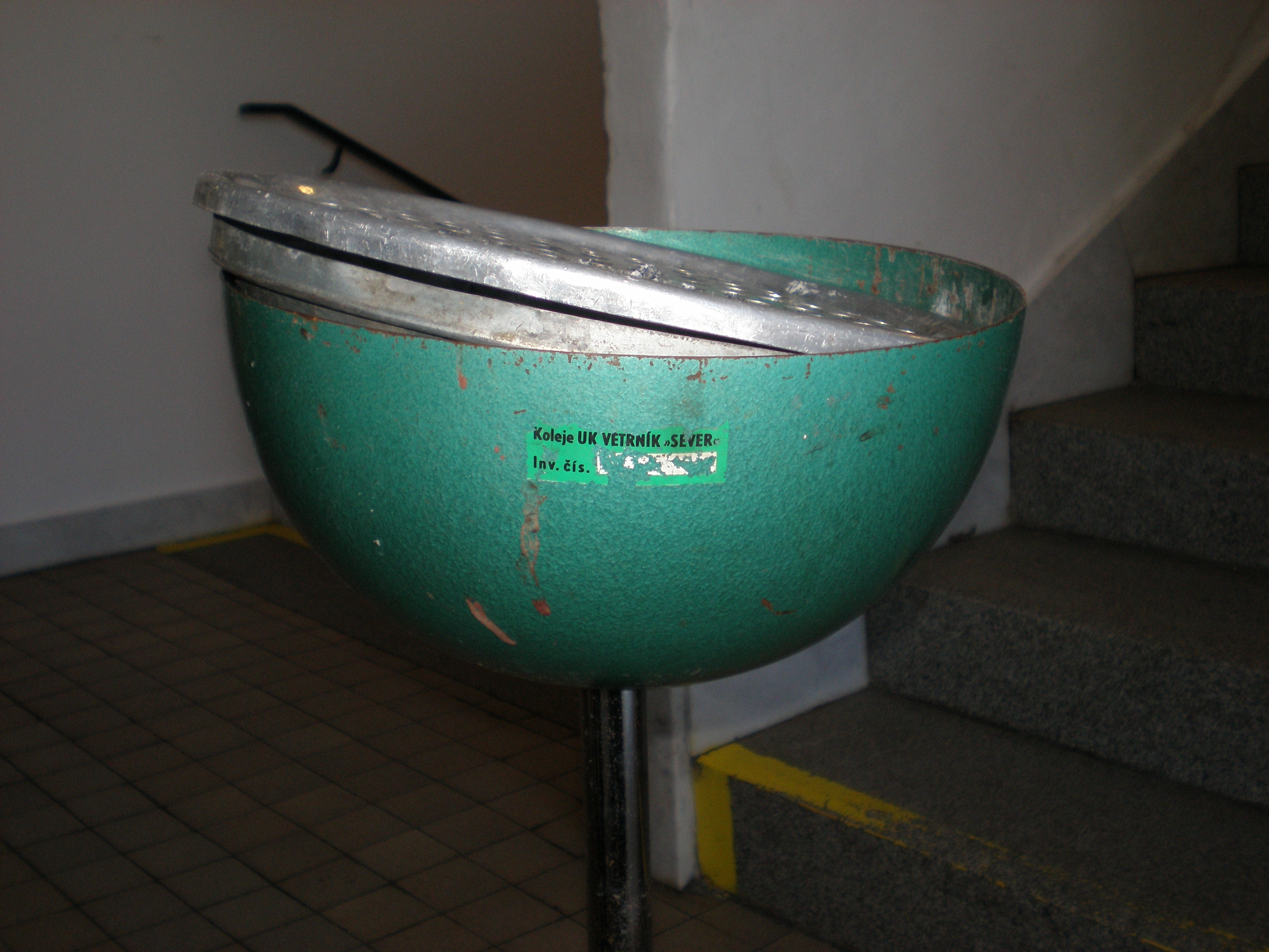 Cedulka se starým názvem koleje "Větrník-sever" (dnes kolej Na Větrníku, Praha) na popelníku v chodbě 3. bloku koleje (3B).